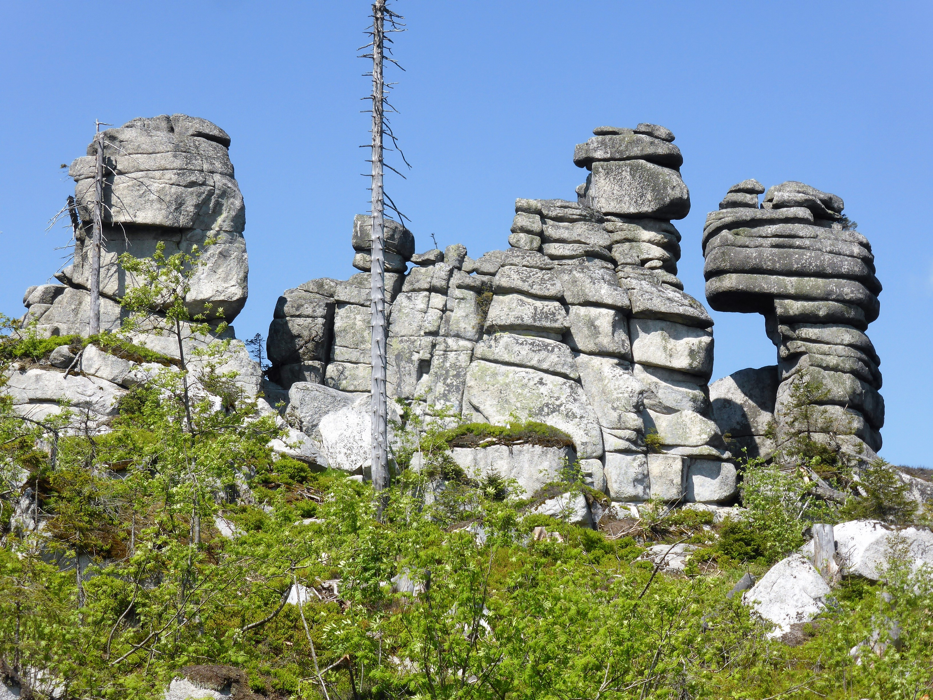 Felsformation mit Wollsackbildung links vom Hochstein (Dreisesselberg). Geotop im Landkreis Freyung-Grafenau und Naturschutzgebiet.